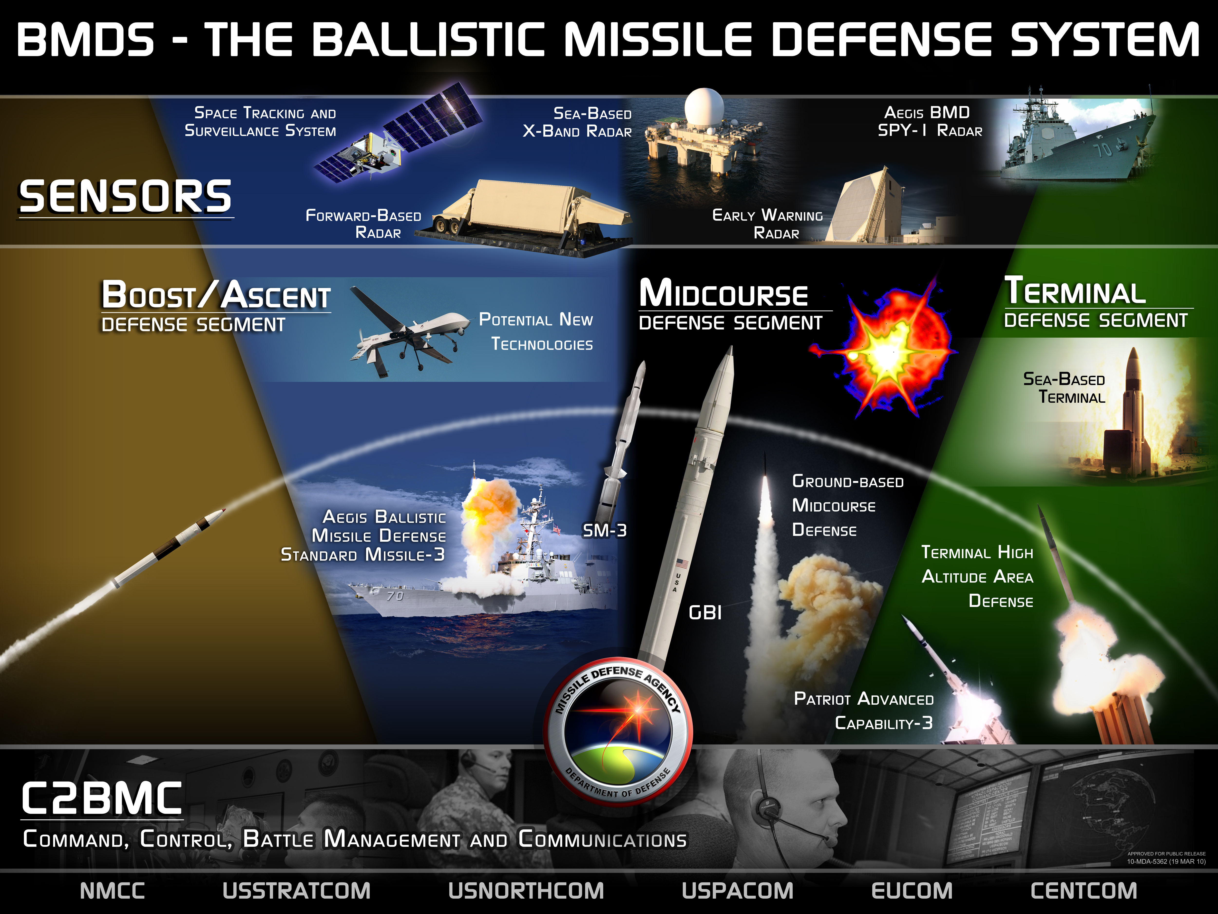 Ballistic Missile Defense System Overview.